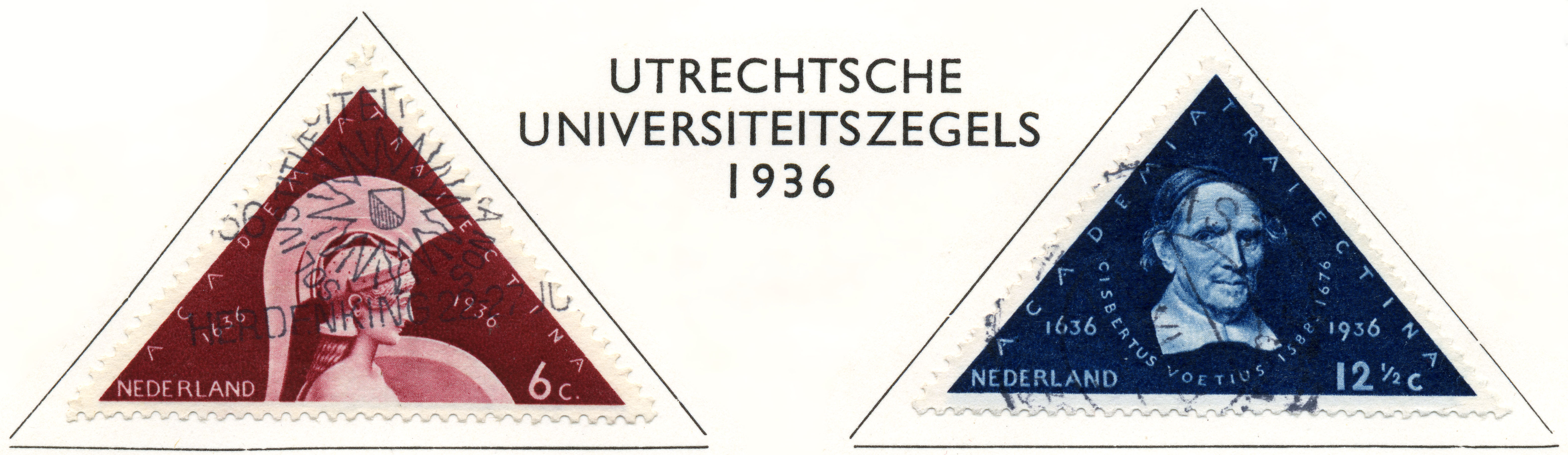 Universiteit Utrecht. Pallas Athene, Godin der wijsheid en Gijsbert Voetius 1588-1676, Hoogleraar theologie (1936)